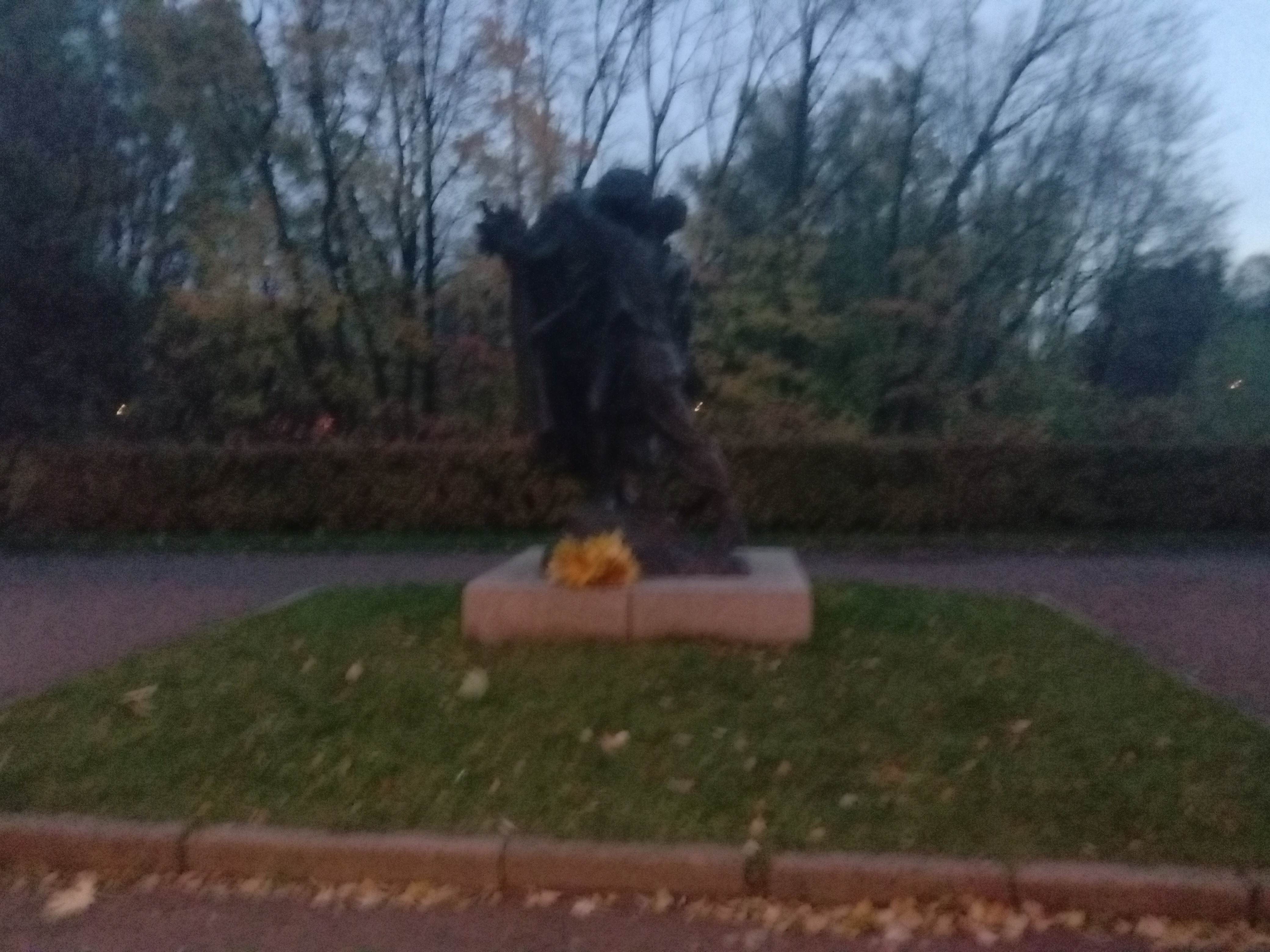 Заместитель главнокомандующего Монгольской народной армией Жамьянгийн Лхагвасурэн (справа) и дивизионный комиссар Д. Пэлжээ